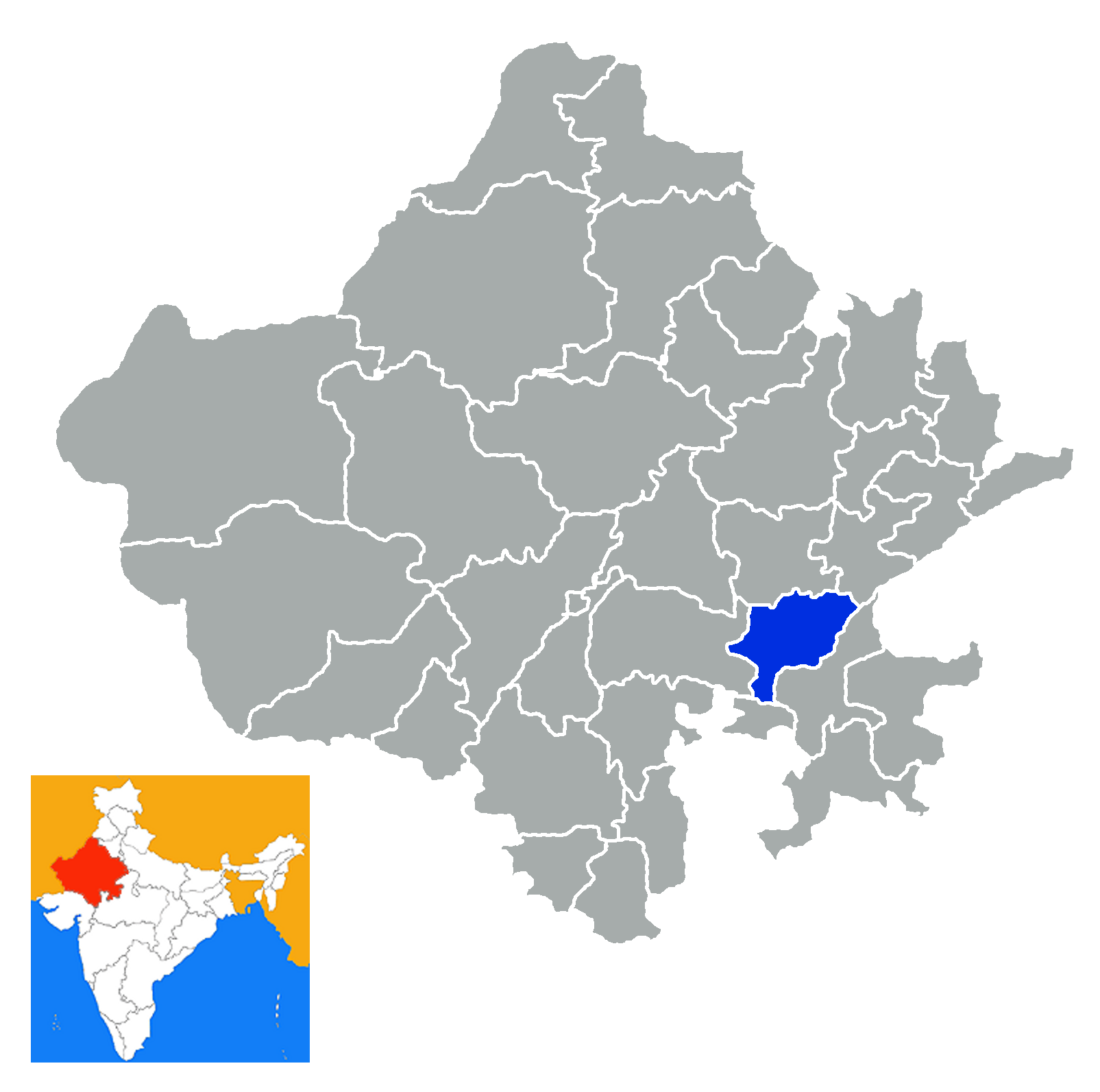 Distrito de Bundi Rajastan India